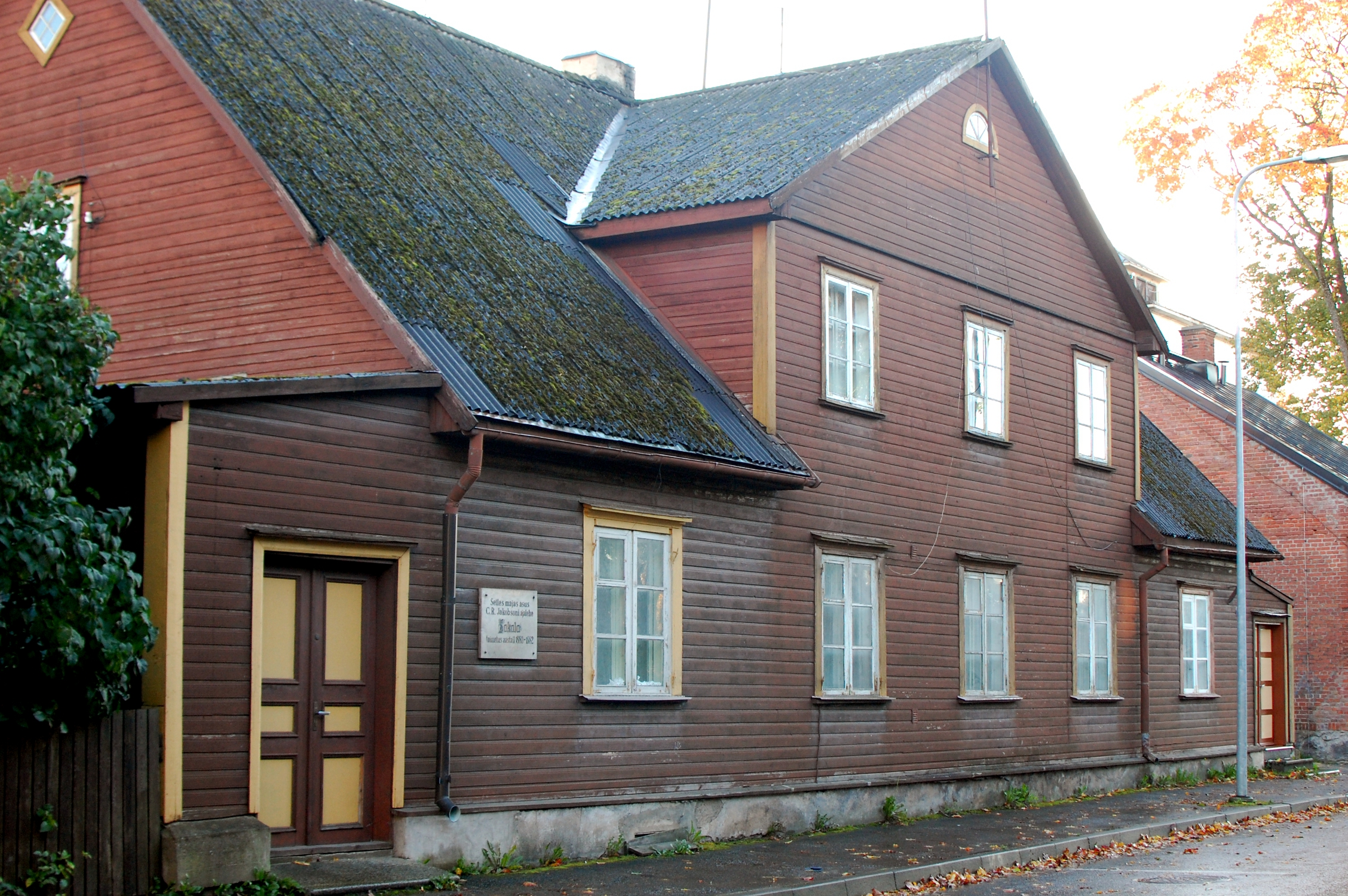 Maja, kus aastail 1880-1882 asus ajalehe "Sakala" toimetus